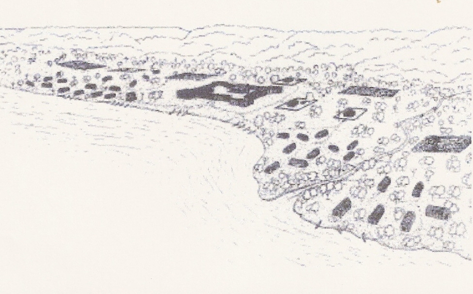 Iconographie représentant le Fort Pimiteoui situé en Nouvelle-France en 1702.